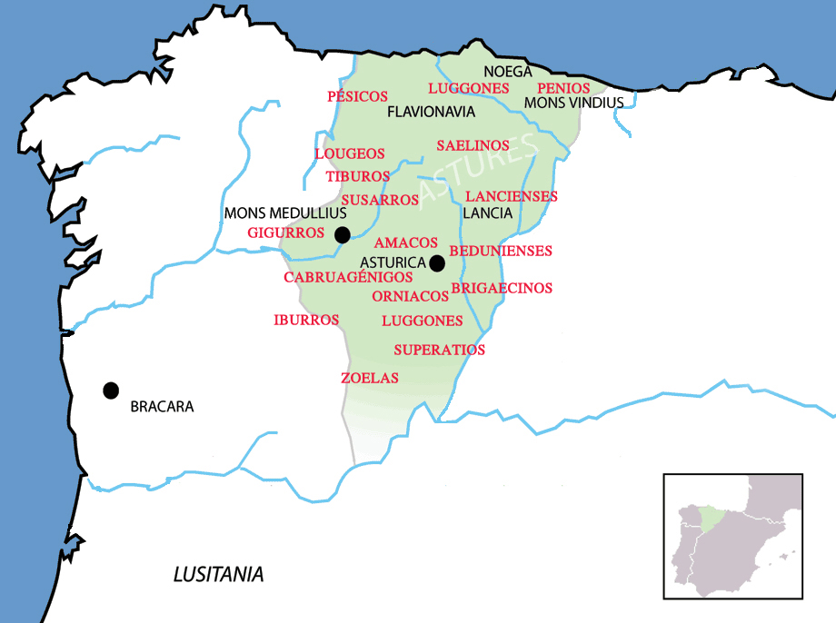 Astures